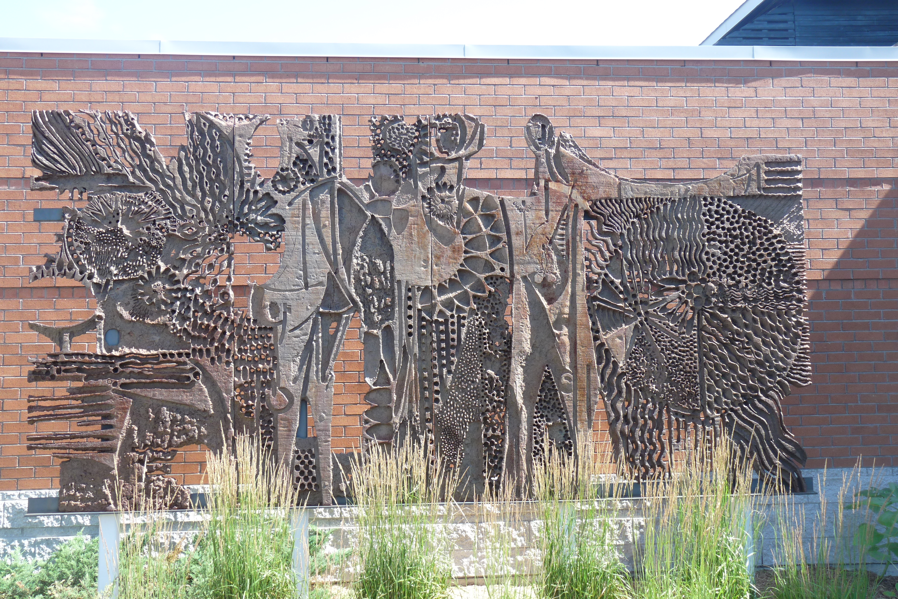 Sculpture les trois soleils de Jordi Bonet (circa 1970) devant la bibliothèque de Mont-Saint-Hilaire